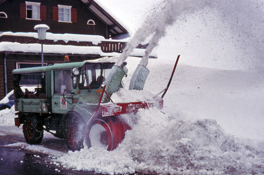 Unimog Schneefräse Kleinwalsertal - Unimog Snow blower Kleinwalsertal